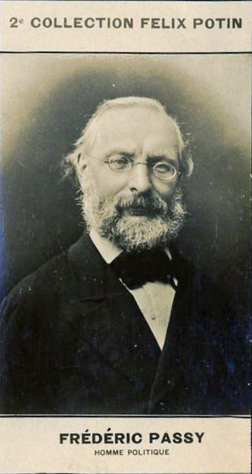 Passy, Frédéric homme politique